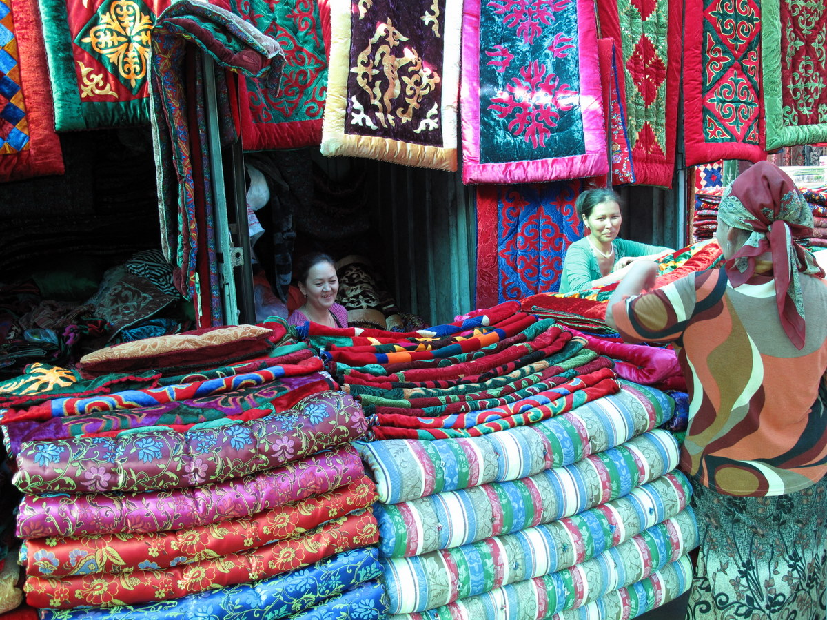 at Osh Bazar in Bishkek